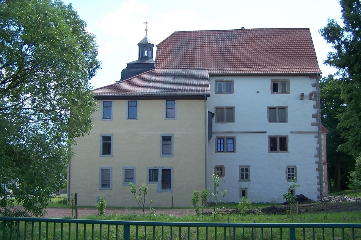 Schloss Wildprechtroda - Ansicht von Süden